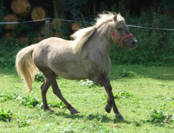 Classic Pony Stute Fynnja